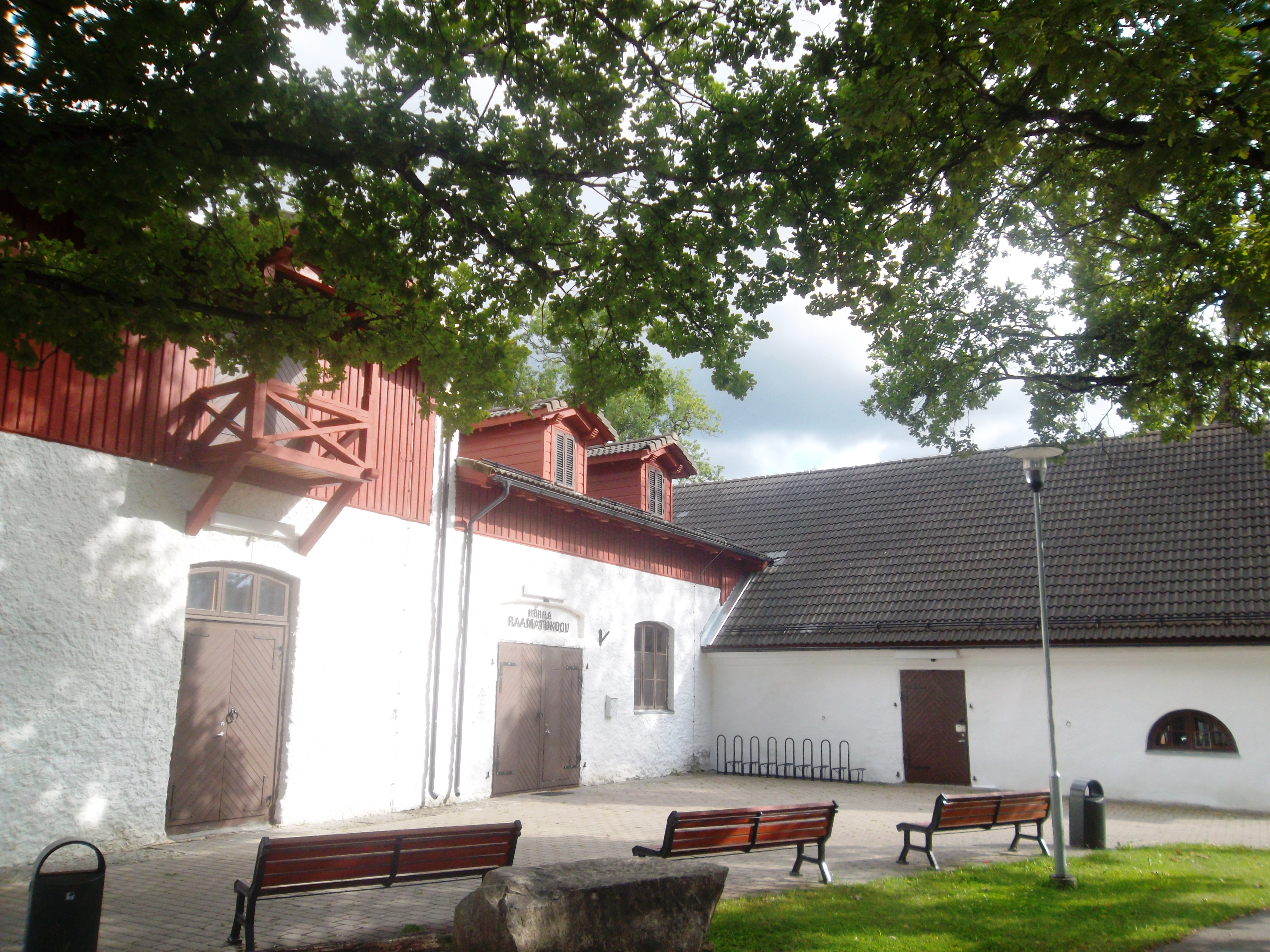 Кохилаская библиотека.